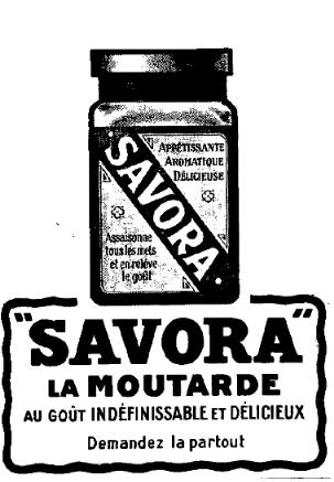 Encart publicitaire paru dans le magazine français Je sais tout (1921).